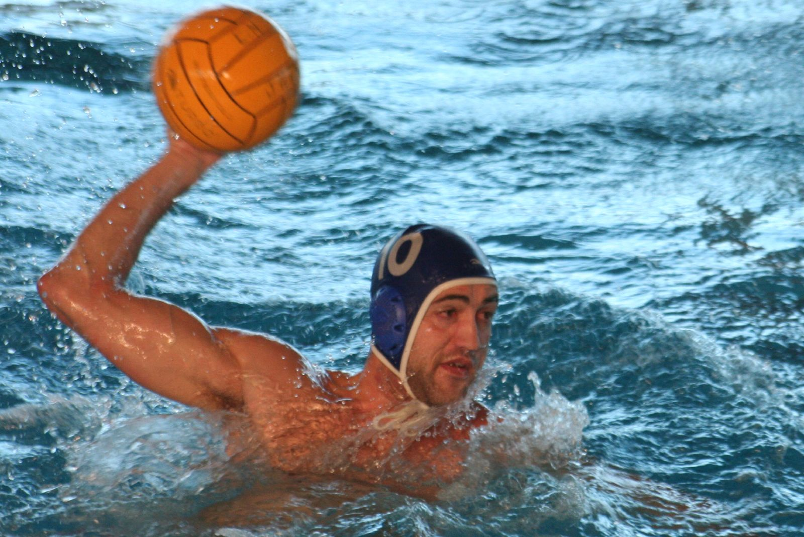 Partido de Waterpolo en España, Jaén.